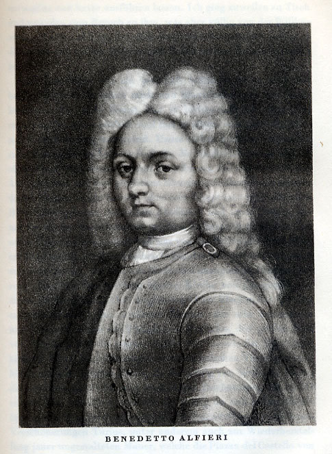 comte Benedetto Alfieri, italian architect. (Ritratto di Benedetto Alfieri, tratto dal libro "Leben des Vittorio Alfieri", Frankfurt 1924 Gedruckt bei Poeschel & Trepte in Leipzig)